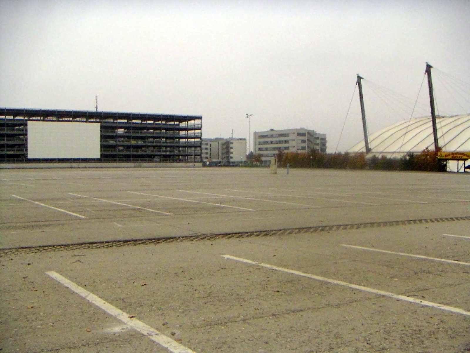 Unterpremstätten bei Graz, Autokino (Oktober 2005)